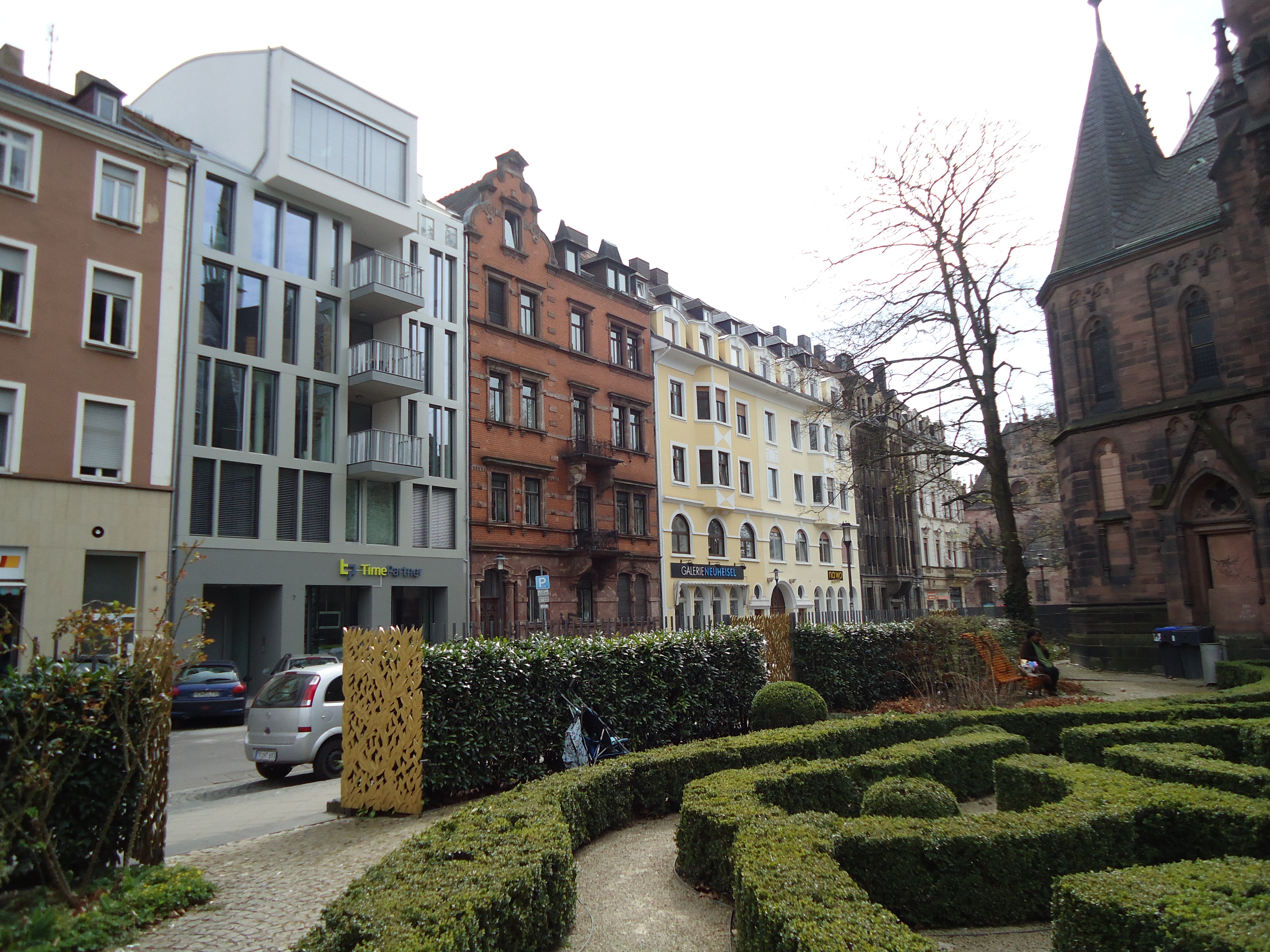 Der Park hinter der Johanniskirche mit der Gründerzeit-Häuserreihe und einem Neubau